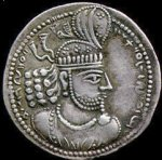 Pièce du règne de Narseh